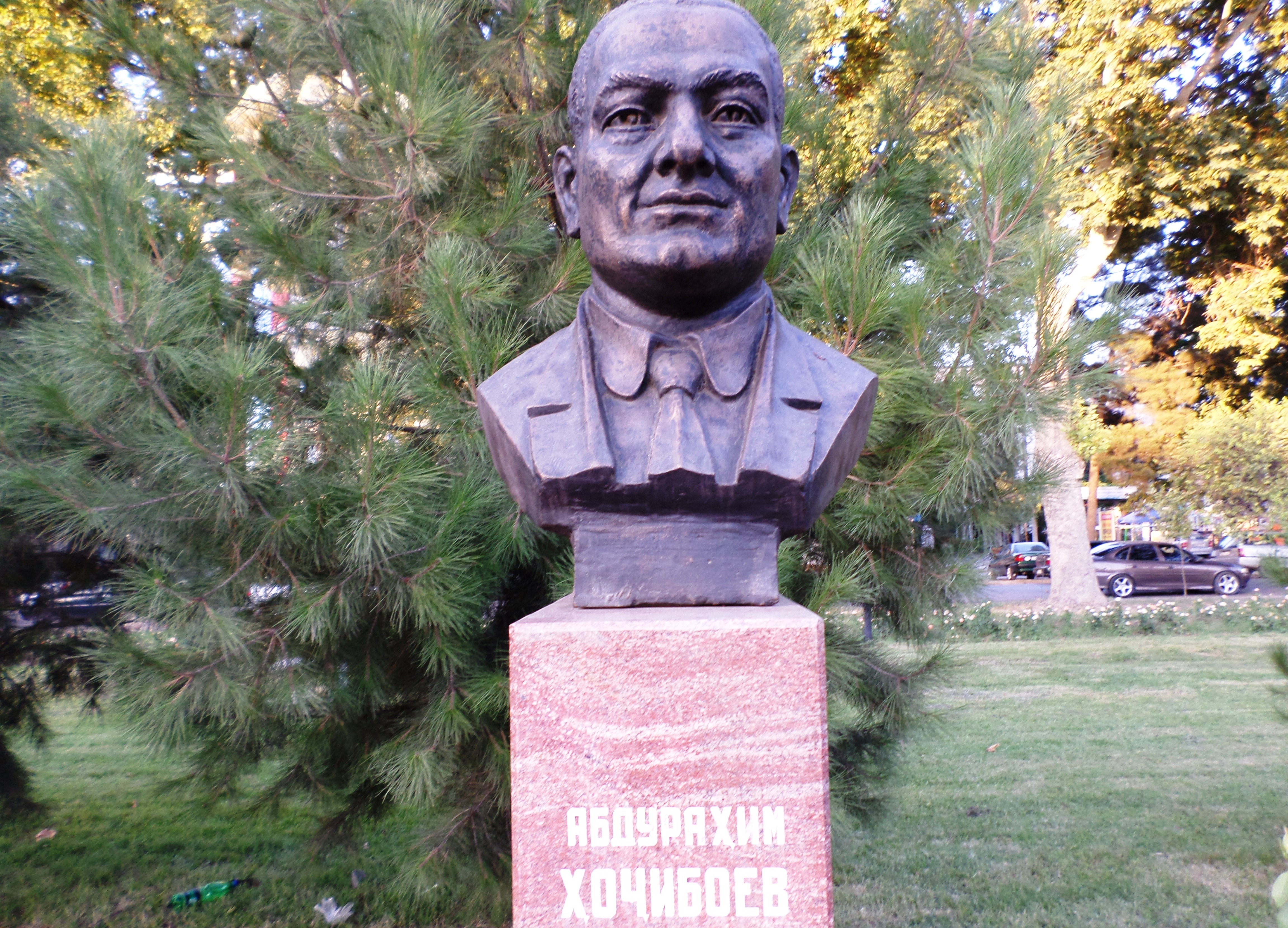 Абдурахим Хаджибаев, участник установления човетской власти в Таджикистане, государственный деятель